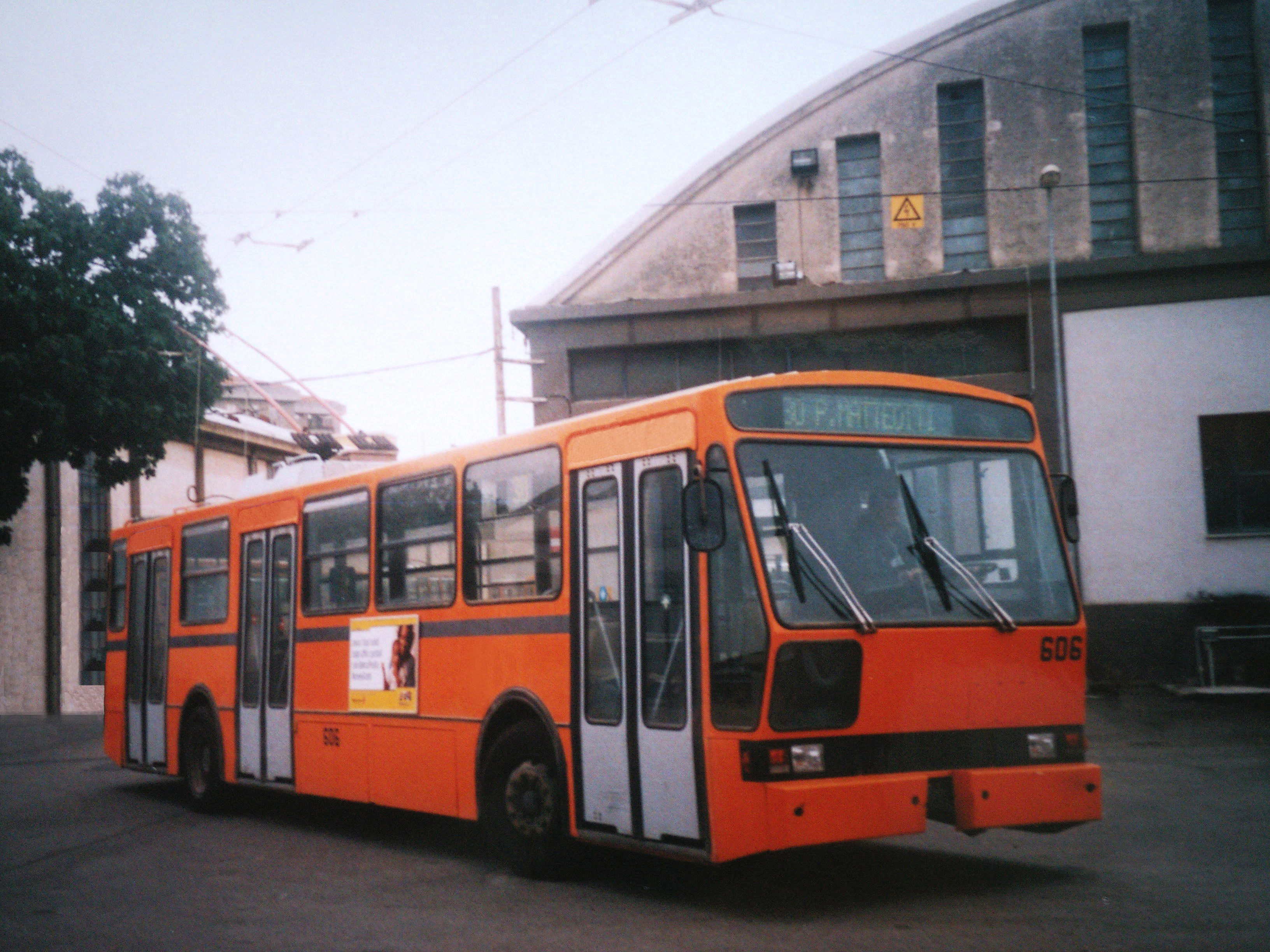 filobus INBUS F140 BREDA n. 606